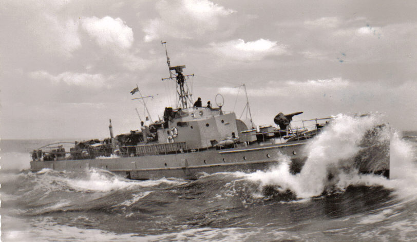 Räumboot Algol 1958, Deutsches Minenräumboot der Aldebaran-Klasse